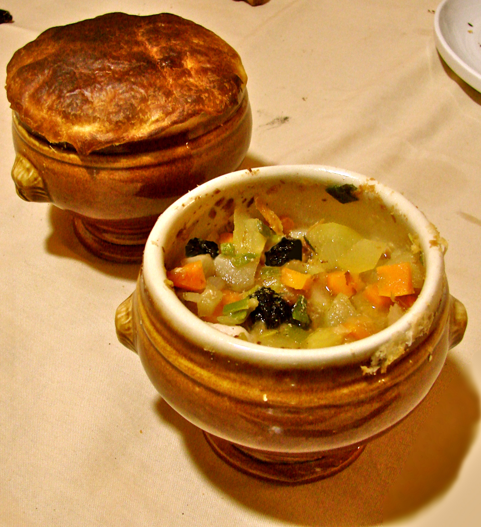 Soupe aux truffes noires VGE : une portion de soupe VGE est composée de 20 grammes de truffes noires fraîches, crues et râpées, de 20 grammes de foie gras, de 20 grammes de paleron ou de blanc de poulet pochés, d'une cuillerée à potage de Noilly Prat, d'une louche de consommé double, de bœuf ou de volaille, et de 2 cuillerées à potage d'un matignon composé à parts égales de carottes, d'oignons, de céleri et de champignons étuvés au beurre. Remise de la Légion d'honneur à Paul Bocuse : la soupe aux truffes noires VGE fut créée par Paul Bocuse le 25 février 1975 par le chef Paul Bocuse, pour un banquet organisé par le président Valéry Giscard d'Estaing et son épouse Anne-Aymone au palais de l'Élysée, en l'honneur de l'admission de Paul Bocuse au grade de chevalier de la Légion d'honneur.